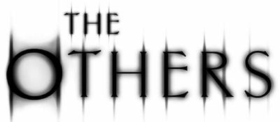 Logo von The Others